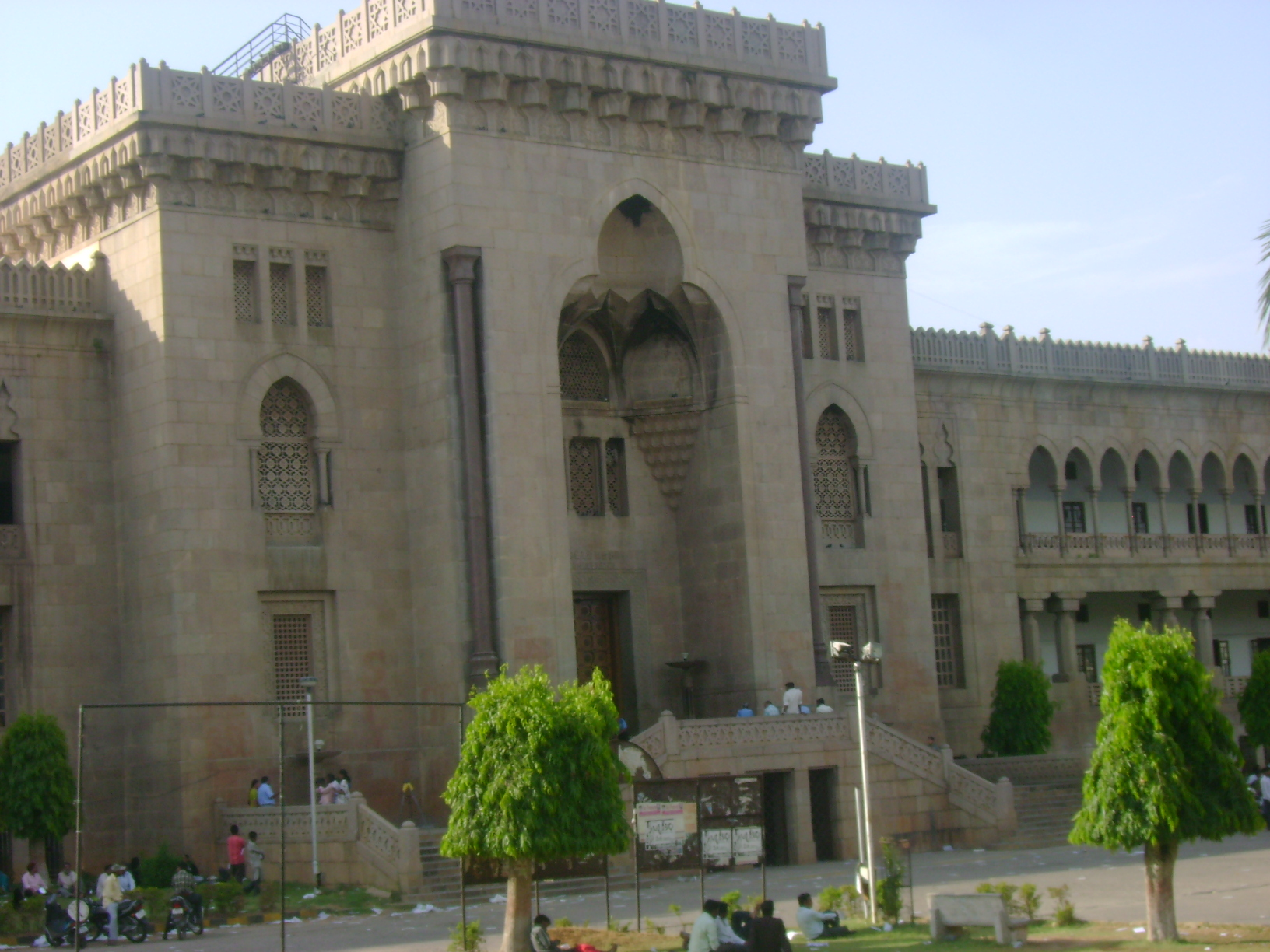 Osmania University, Arts College Photo